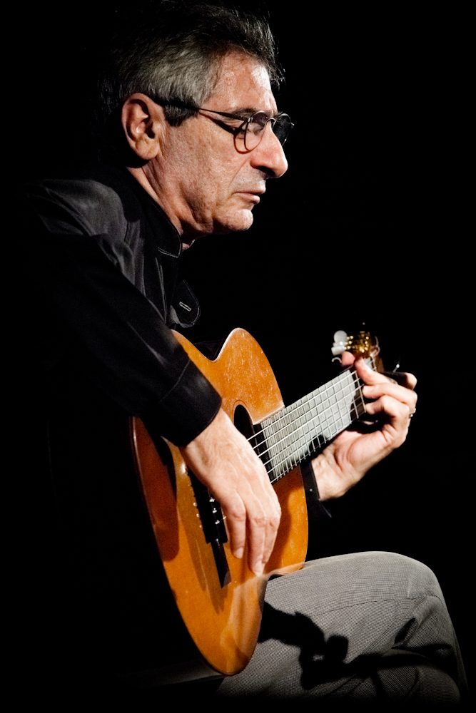 Autore: Luca Spanu; Fonte: immagine fornita dall'autore; Descrizione: Juan Falù in concerto, 13 Luglio 2012, Monserrato (CA), Sardegna; Licenza: "Attribution, Noncommercial, Share Alike"